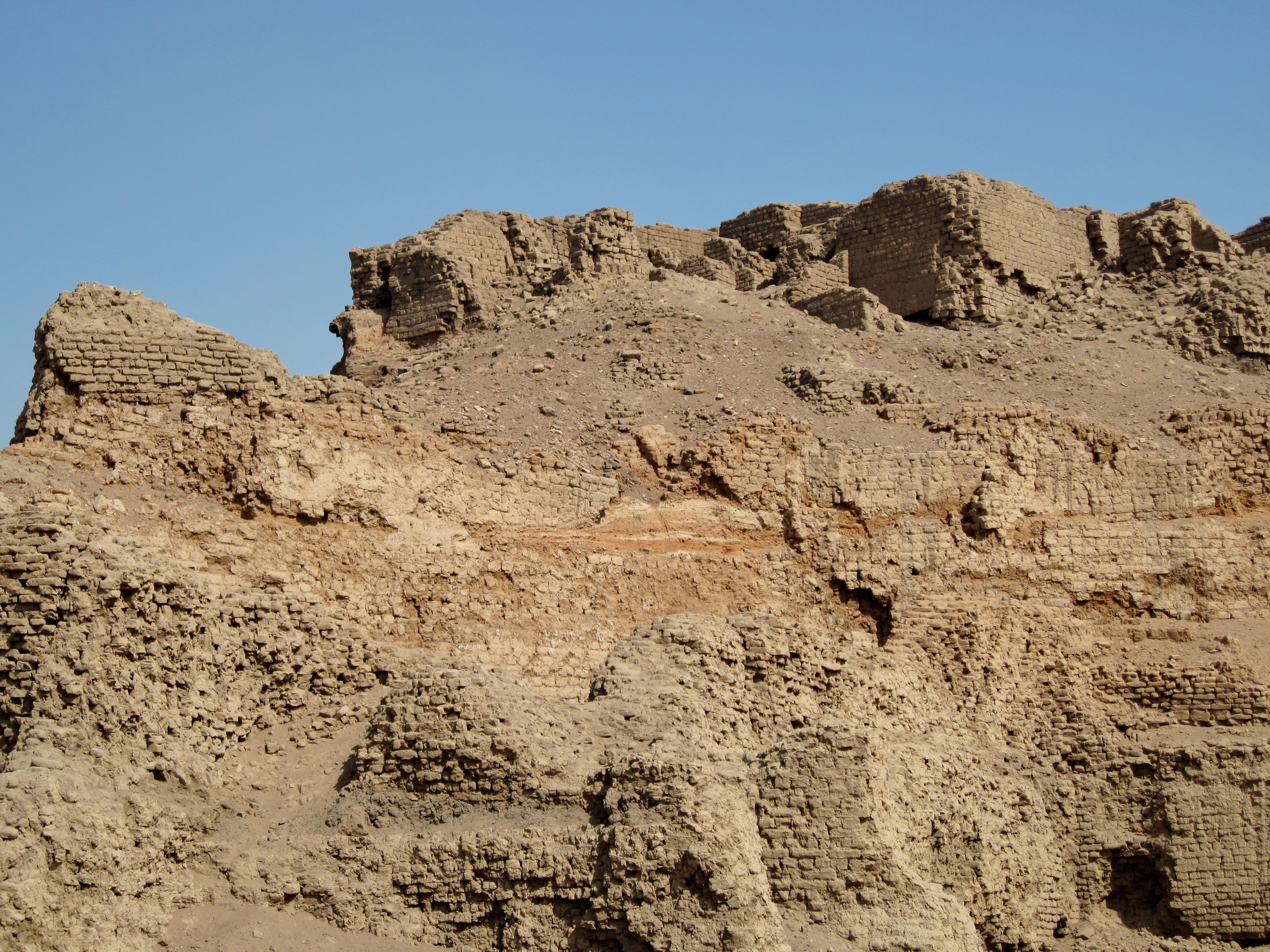 Häuserruinen vor dem Tempel von Edfu, Ägypten